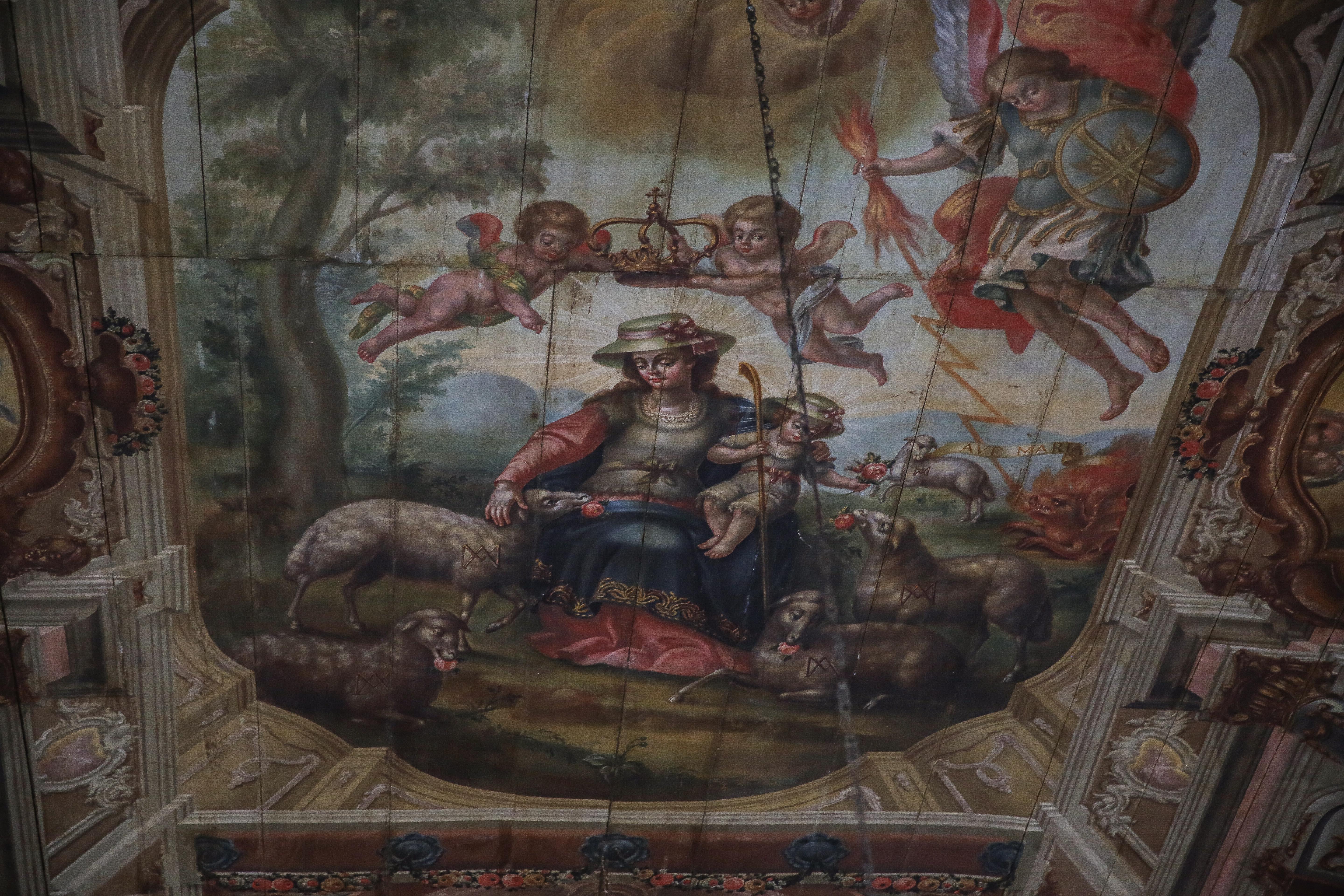 Além de participar do Circuito #CulturaGeraFuturo, o ministro também visitou nesta sexta-feira as igrejas de Nossa Senhora da Conceição da Comandaroba e Matriz Sagrado Coração de Jesus, na cidade histórica de Laranjeiras, e o Santuário da Divina Pastora, na cidade de mesmo nome, todas tombadas pelo Instituto do Patrimônio Histórico e Artístico Nacional (Iphan). Sá Leitão participou ainda da solenidade de comemoração de aniversário da Associação Comercial e Empresarial de Sergipe, que completa 146 anos neste sábado (26). 25.5.2018 Fotos: Clara Angeleas/MinC